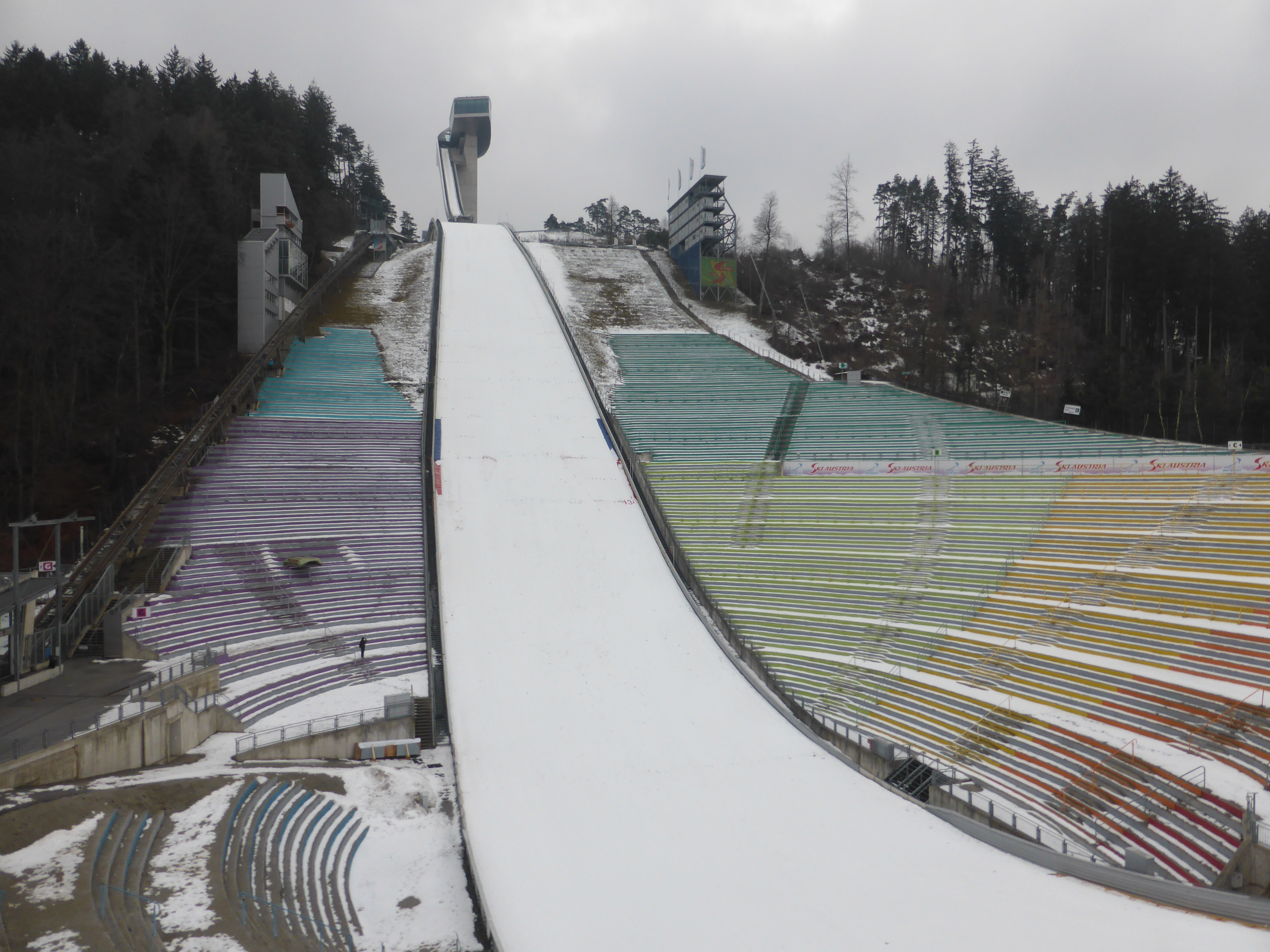 Innsbruck